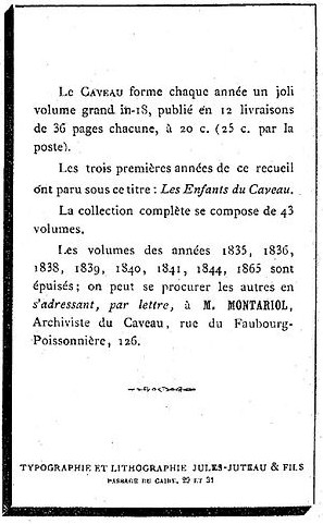 Annonce parue dans le volume édité par "Le Caveau" début 1877.